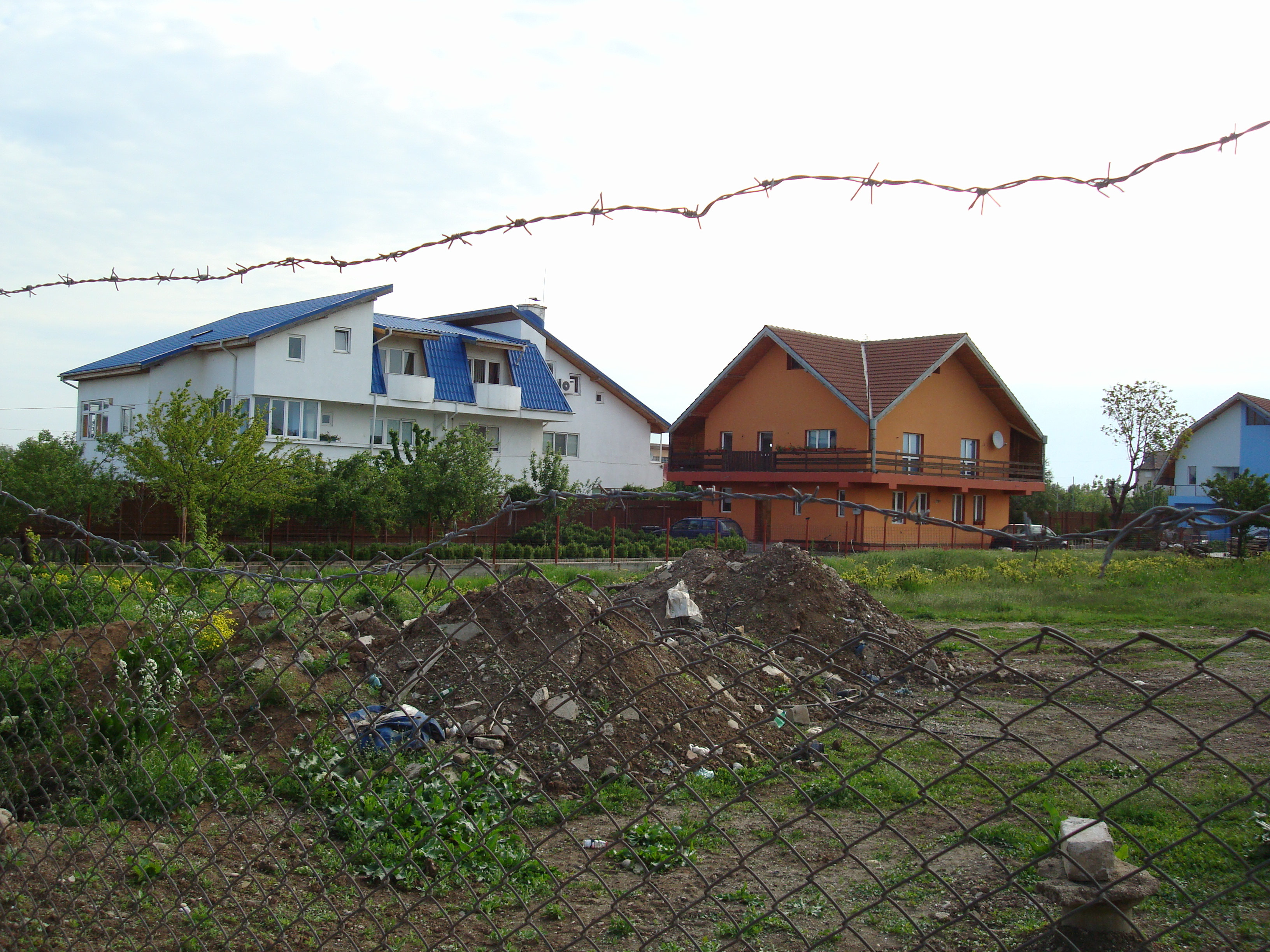 Popești-Leordeni, Romania